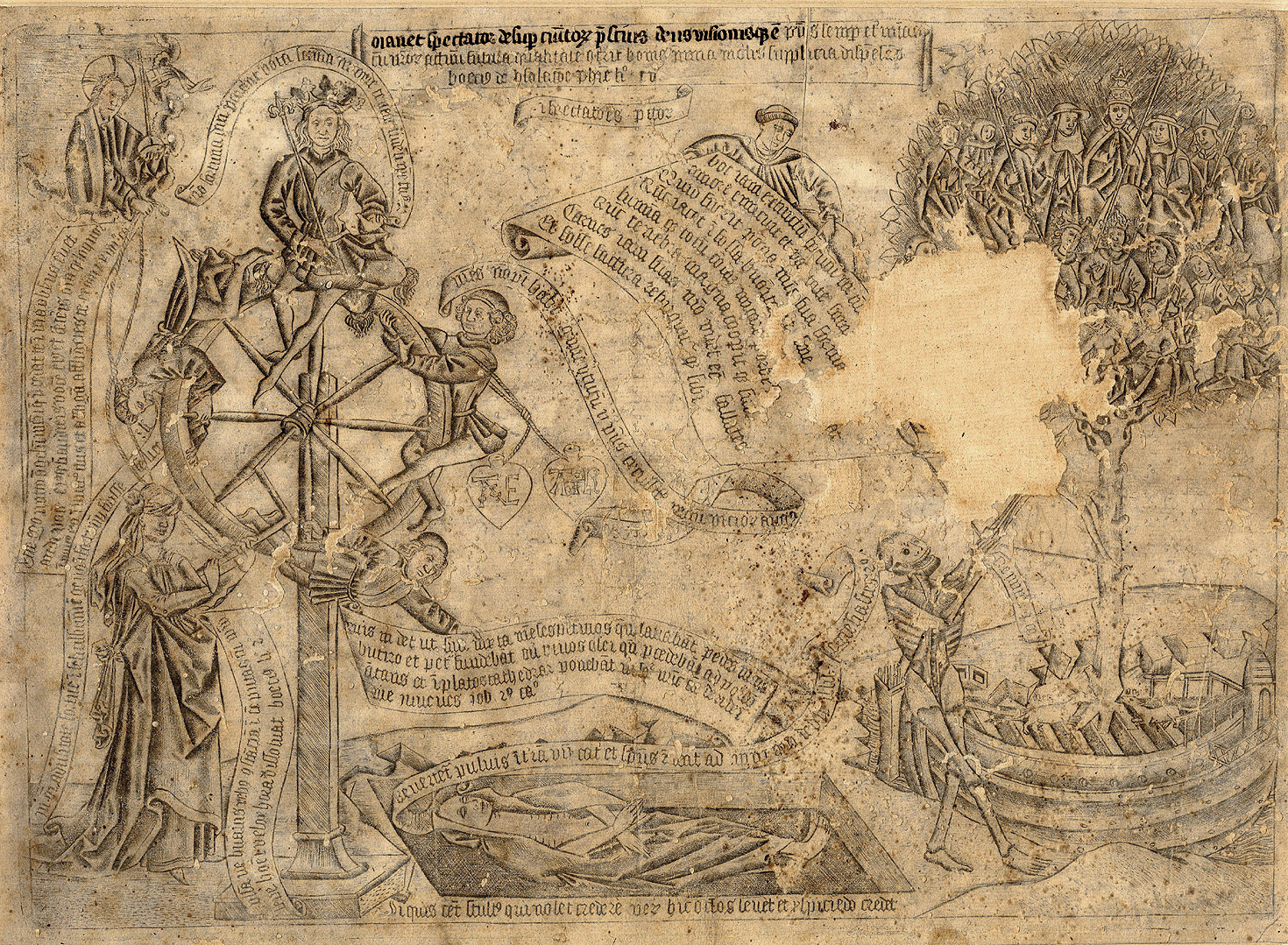 Das Glücksrad, Kupferstich, 2. Hälfte 15. Jh.